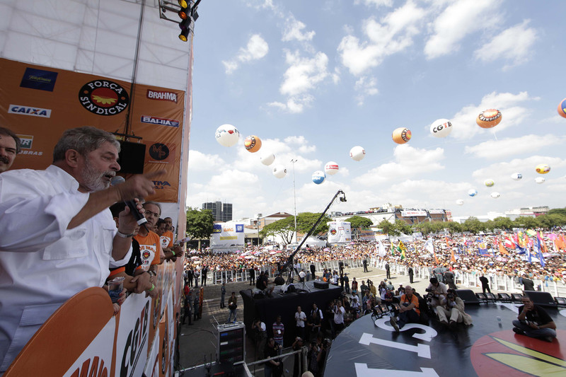 Lula fala durante comemoração do 1º de Maio promovida pela Força Sindical e a Central Geral dos Trabalhadores do Brasil, na praça Heróis da FEB em Santana, São Paulo.